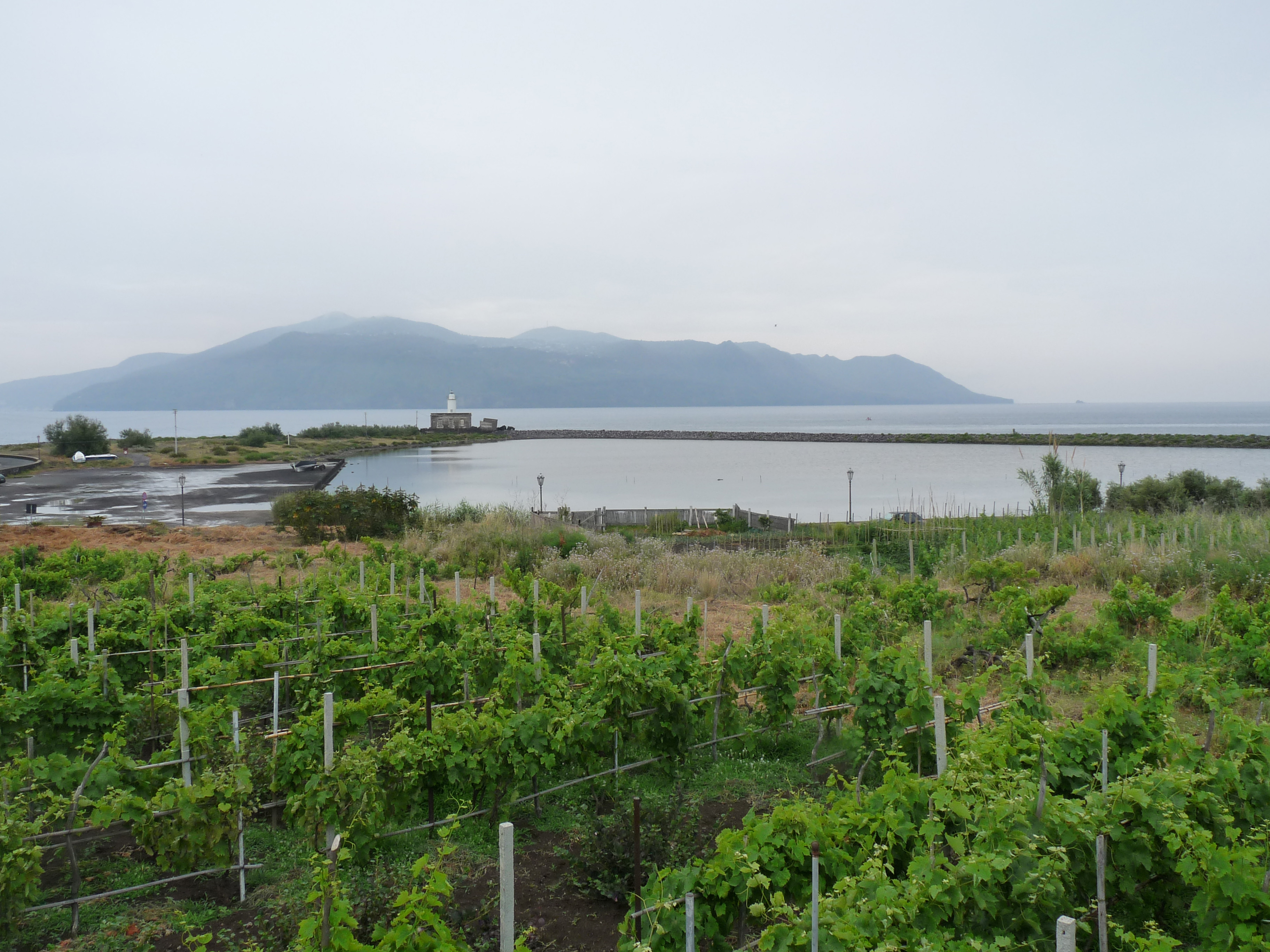 Punta Lingua, au sud-est de l'île de Salina (îles Eoliennes, Sicile). Le petit lac (Lago di Lingua) est un ancien marais salant qui a donné son nom à l'île. Phare (ARLHS ITA 250). Vignoble.